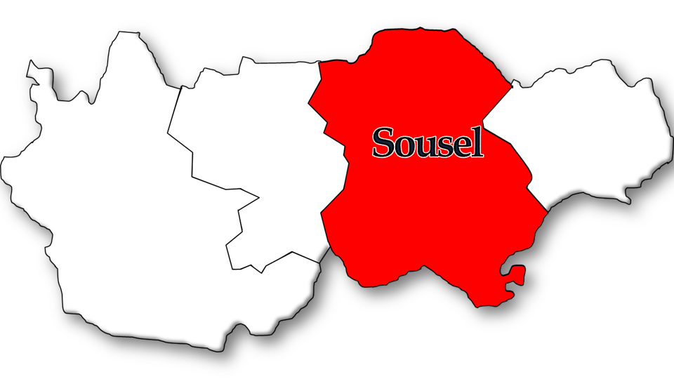 População